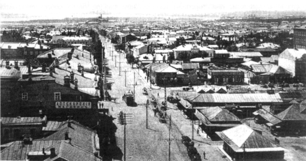 Саратовский крытый рынок. 1910 год.